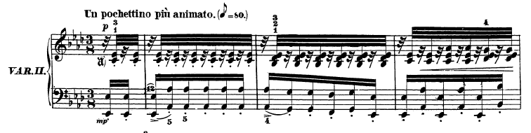 Compassos iniciais do primeiro movimento da Sonata Op. 26 de Beethoven - Variação II